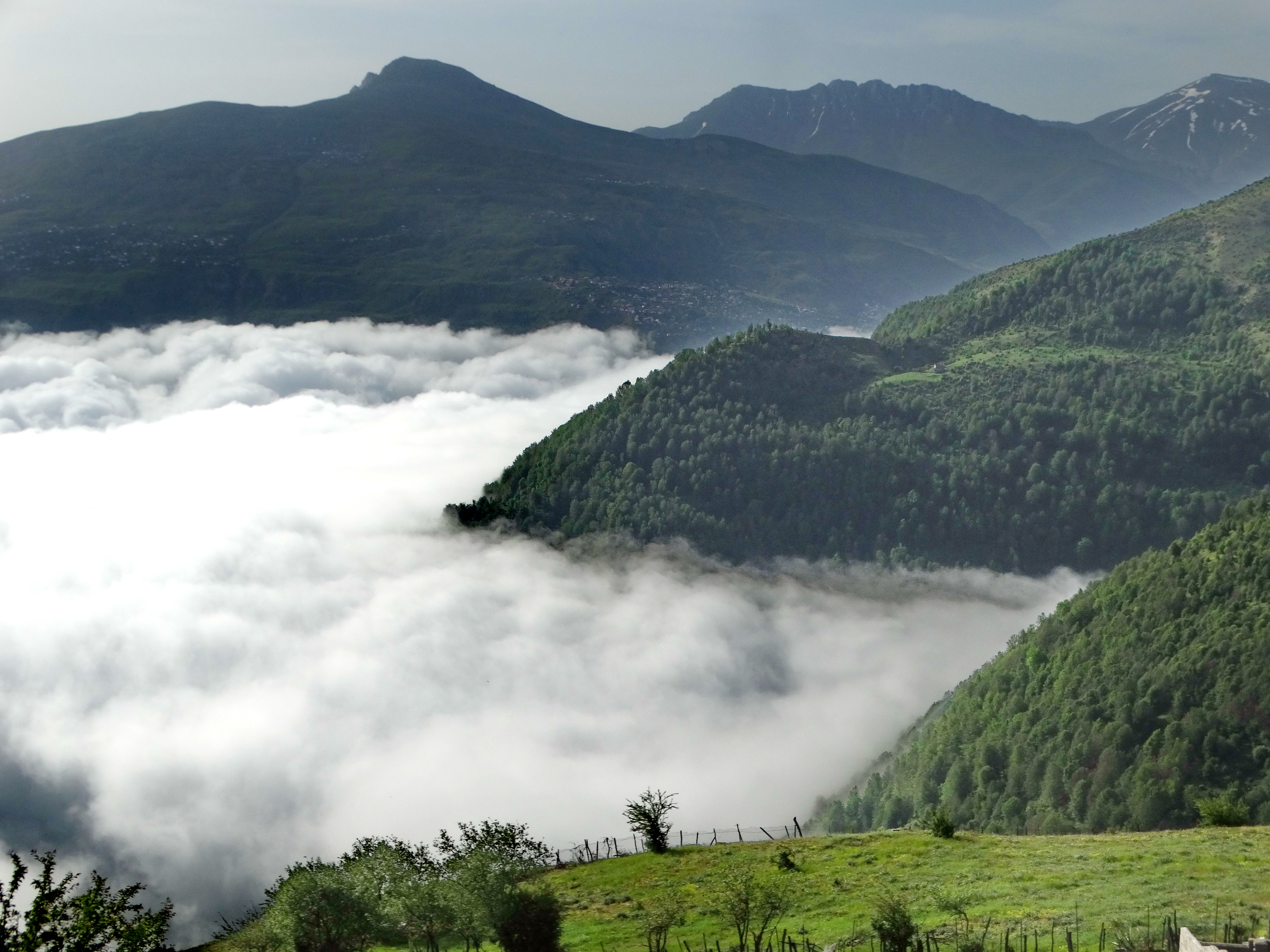 بهار در فیلبند